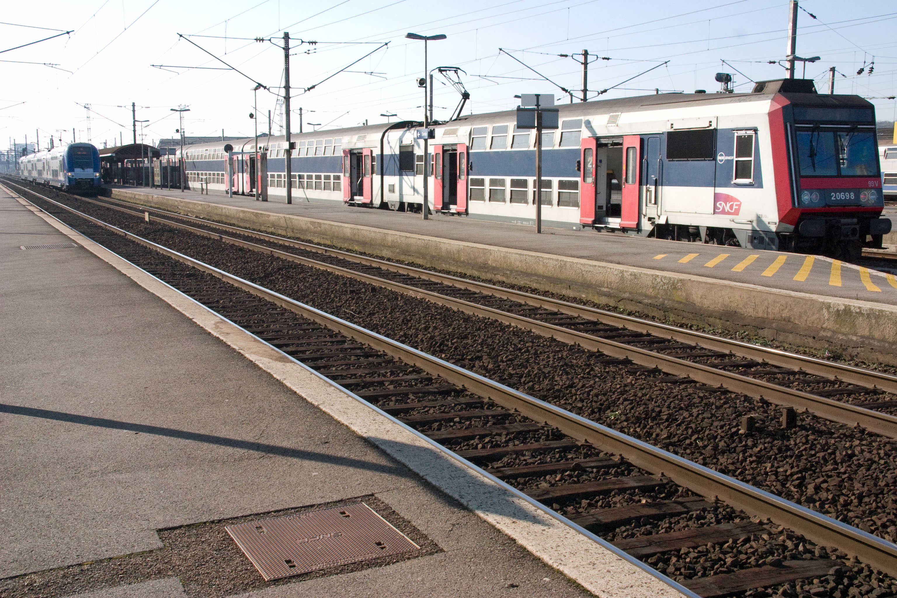 Gare de Creil, Creil, département de l'Oise (France)